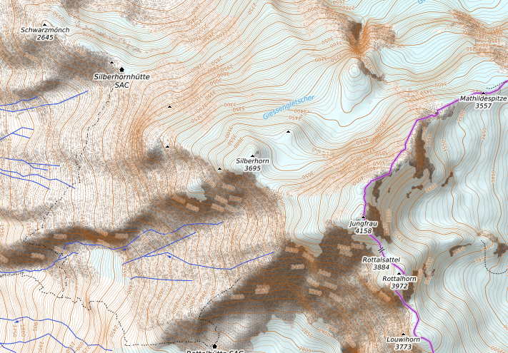 carte réalisée sur umap This map may be incomplete, and may contain errors. Don't rely solely on it for navigation.